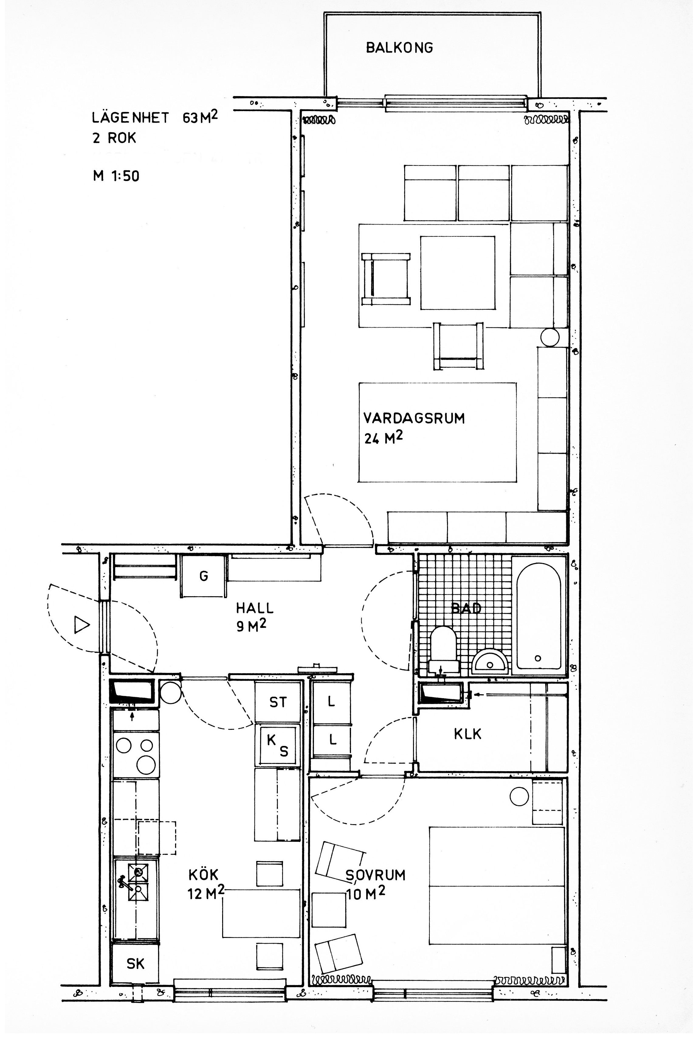 Planritning av en svensk standard-bostad om 2 r.o.k med storlek 68 m2